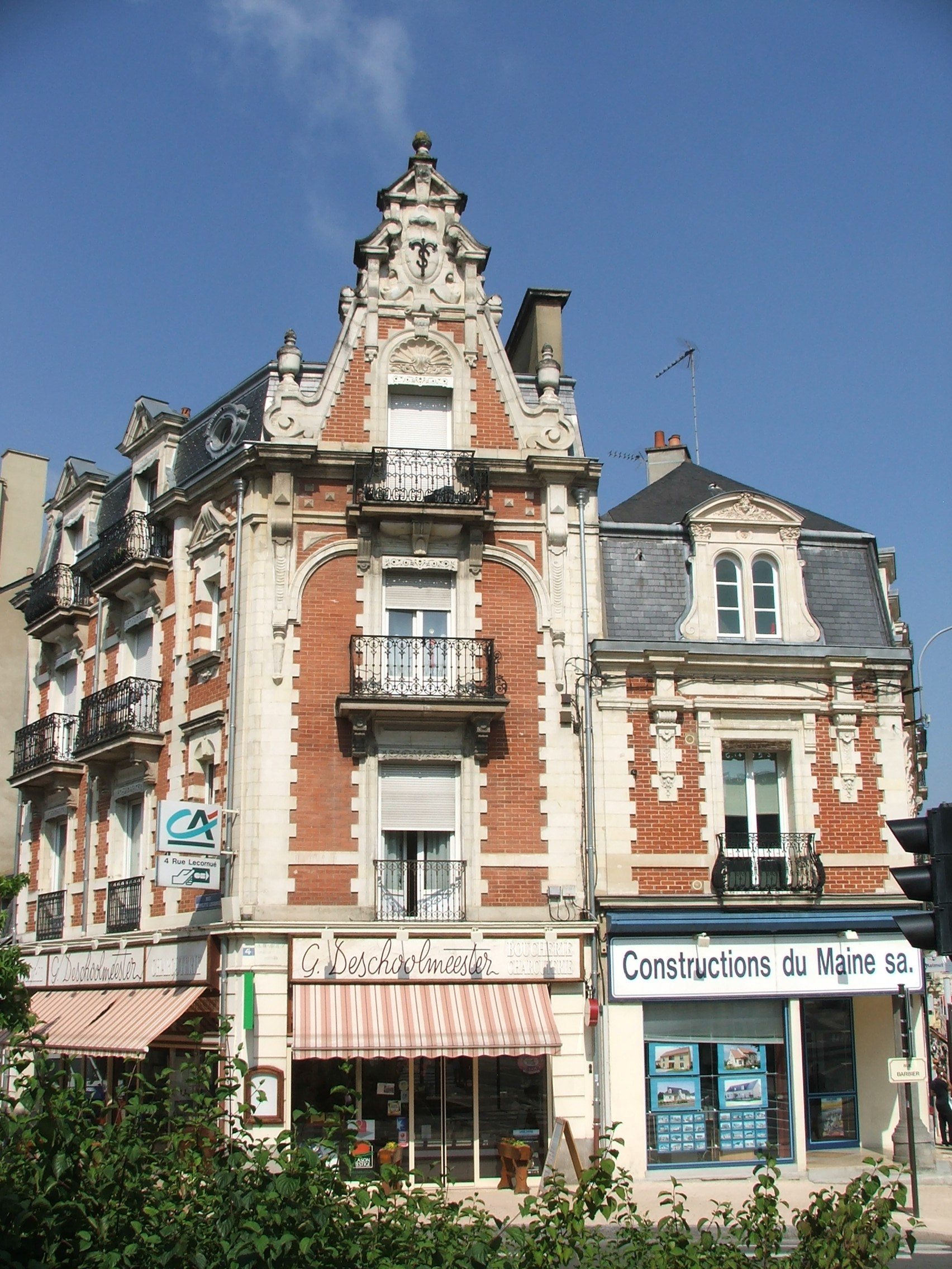 Immeuble commercial de la fin du XIXè siècle au Mans, à l'angle des rues Gambetta et H.Lecornué